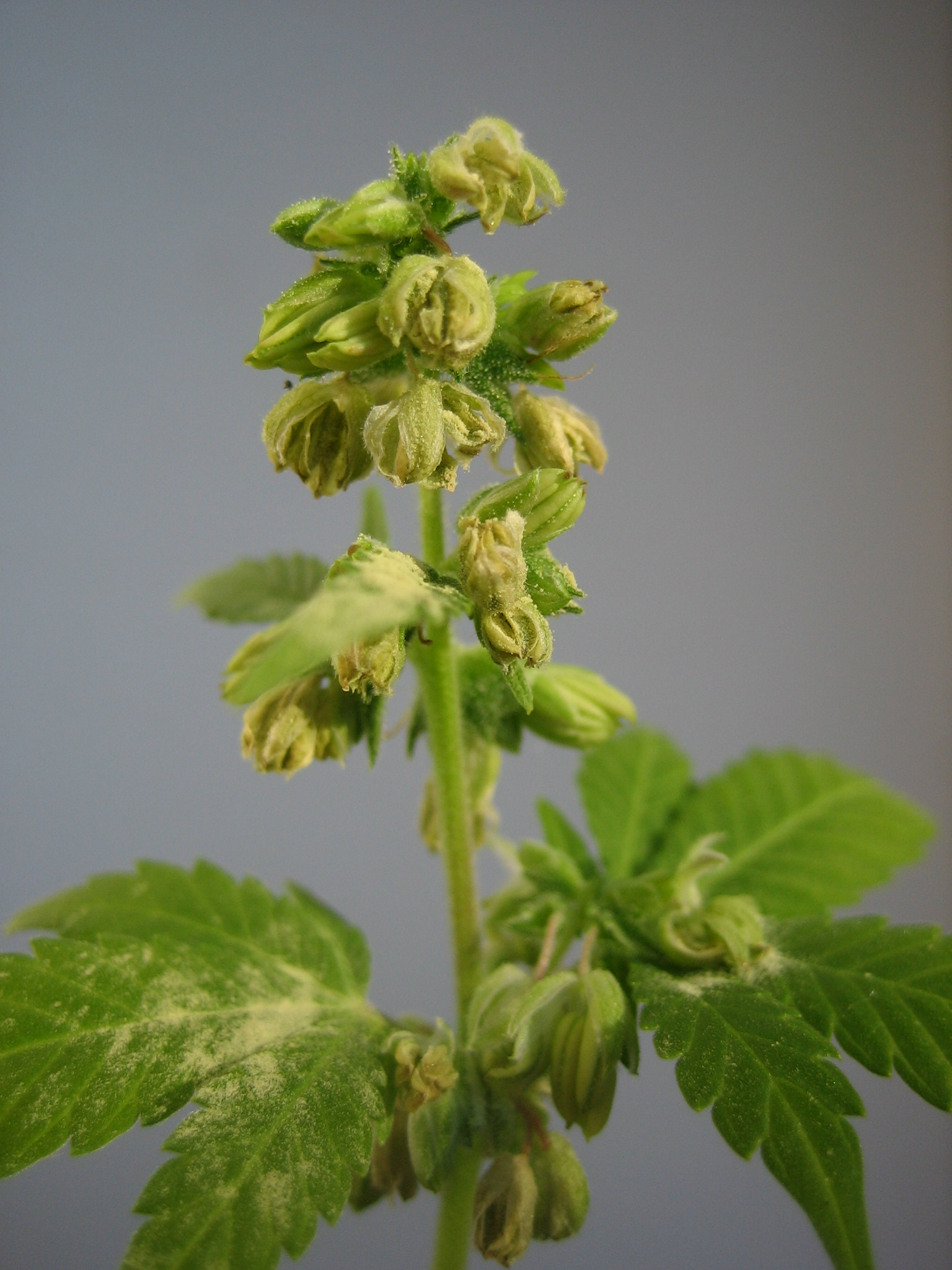 Male hemp flowers. Erik Fendersson, 2006-08-23.